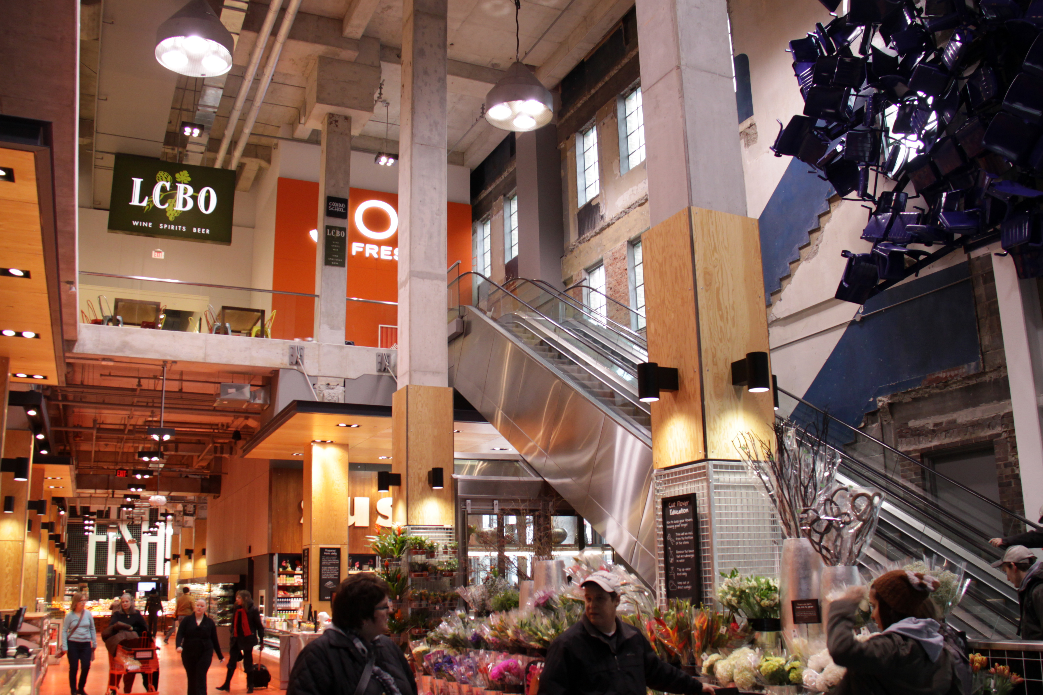 2012_01_04_IMG_4679